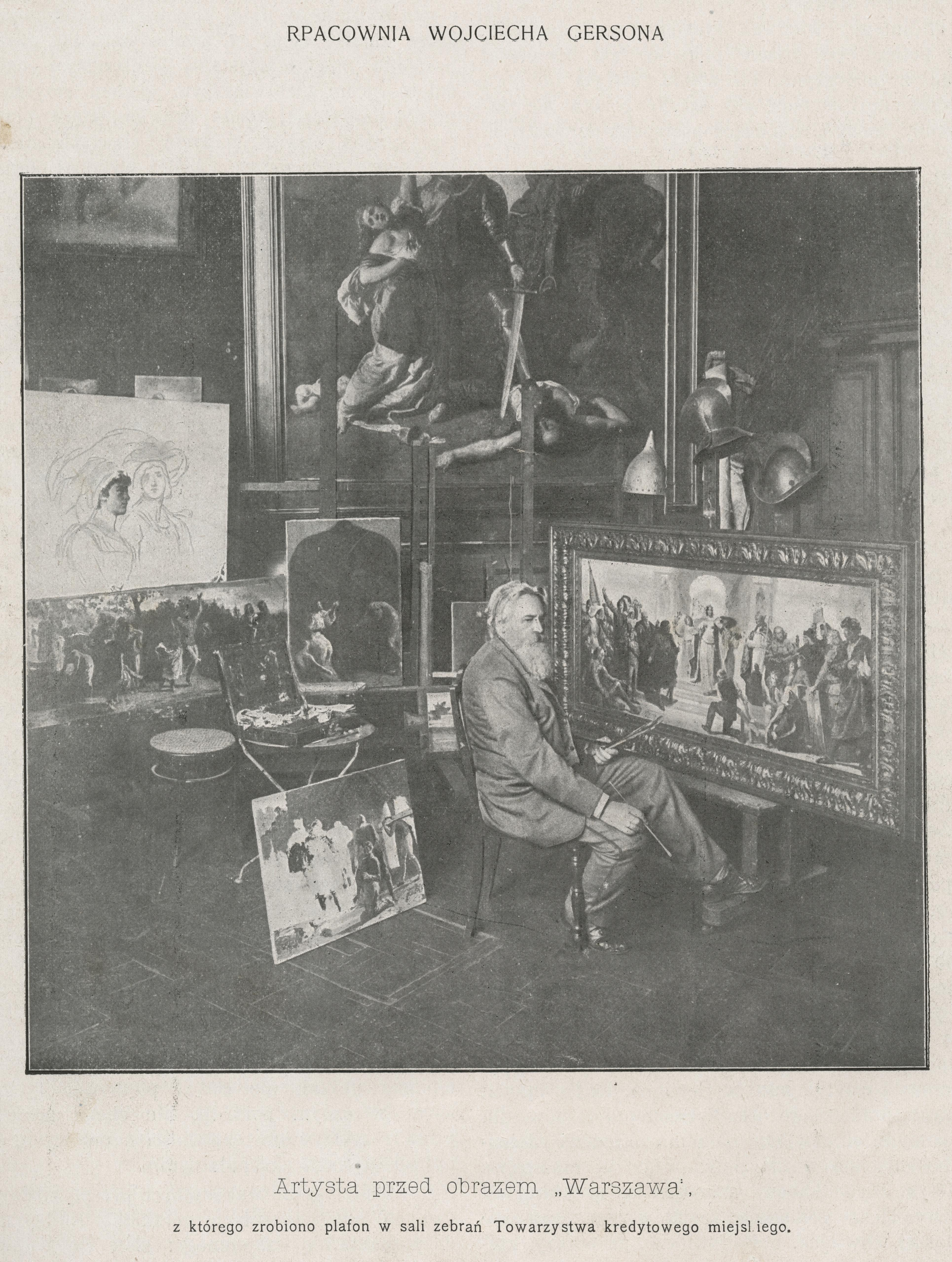 Pracownia Wojciecha Gersona